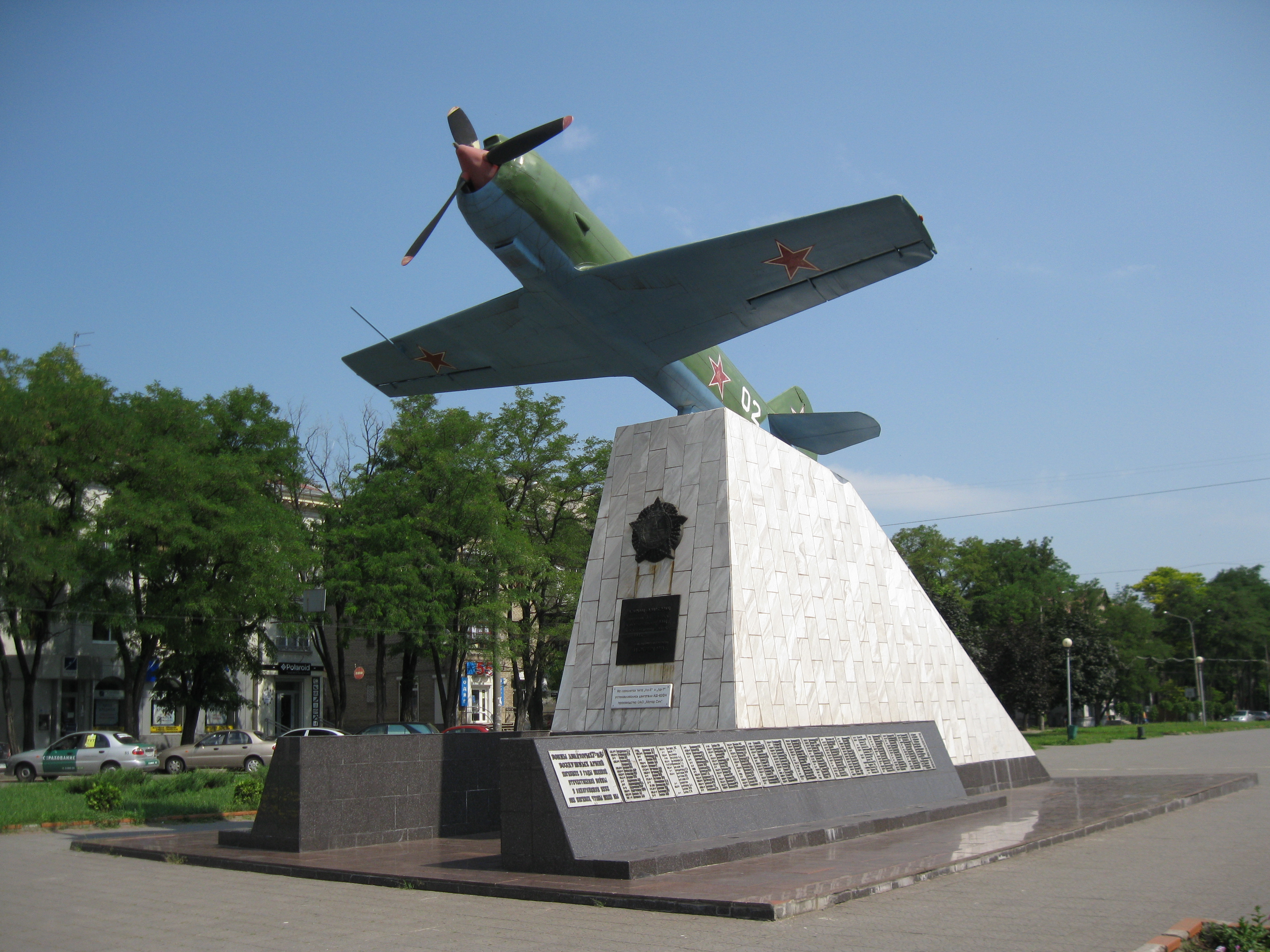 Памятник летчикам в Запорожье (макет Ла-11)